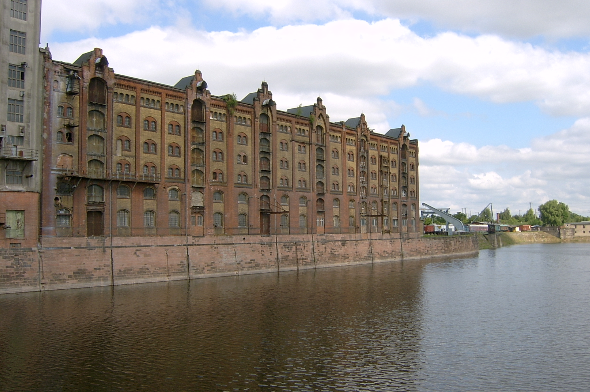 Magdeburger Handelshafen - Speichergebaeude